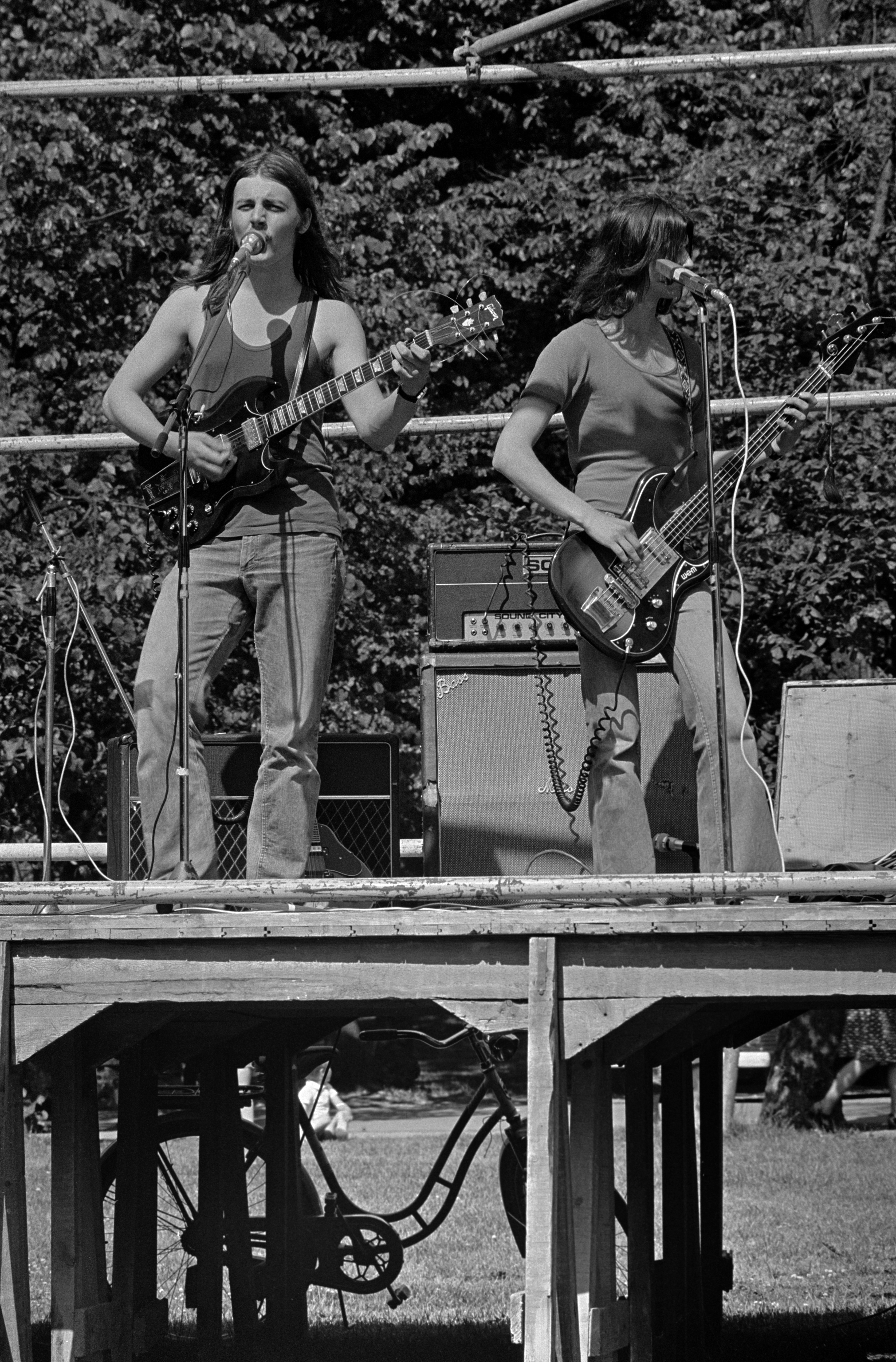 Vanha Isäntä esiintyy Helsingin juhlaviikkojen ulkoilmakonsertissa Kaivopuistossa. Vasemmalla Timo Vakkilainen (kitara), oikealla Seppo Kling (basso).